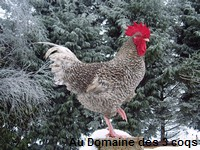 Coq Coucou des Flandres de 2008